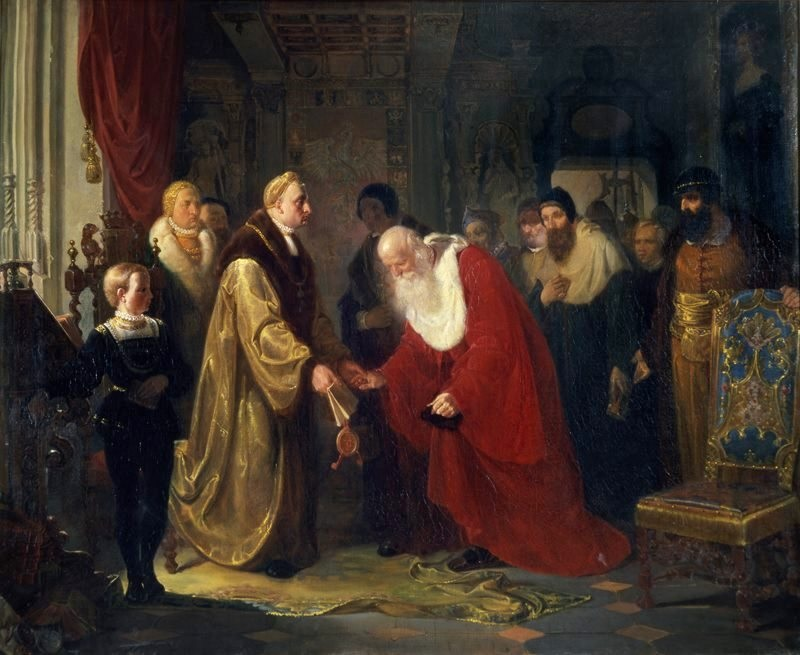 Zygmunt I Stary nadaje szlachectwo profesorom Uniwersytetu Jagiellońskiego (Akademii Krakowskiej) (ok. 1535).